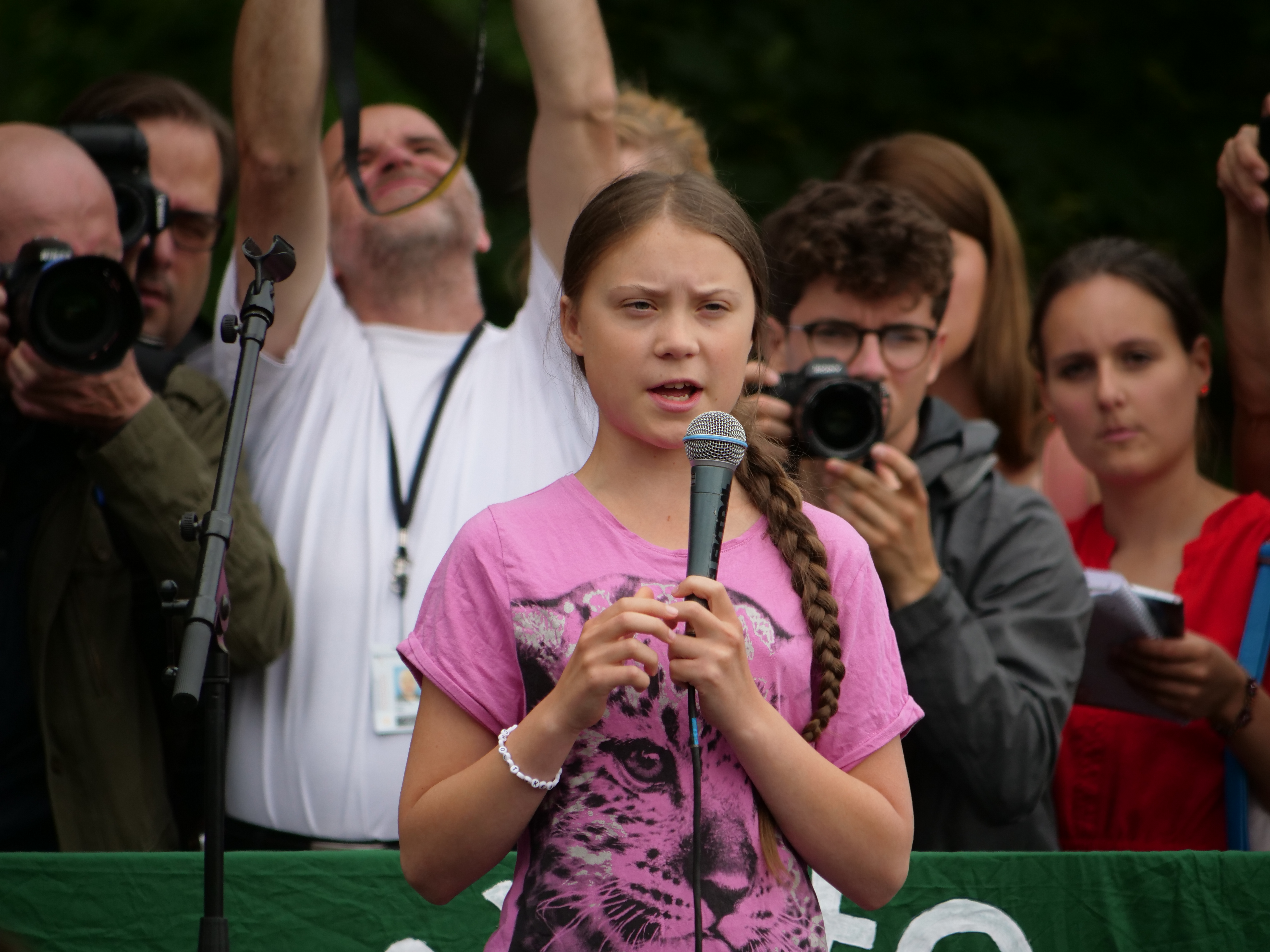 FridaysForFuture Kundgebung im Invalidenpark in Berlin am 19. Juli 2019.